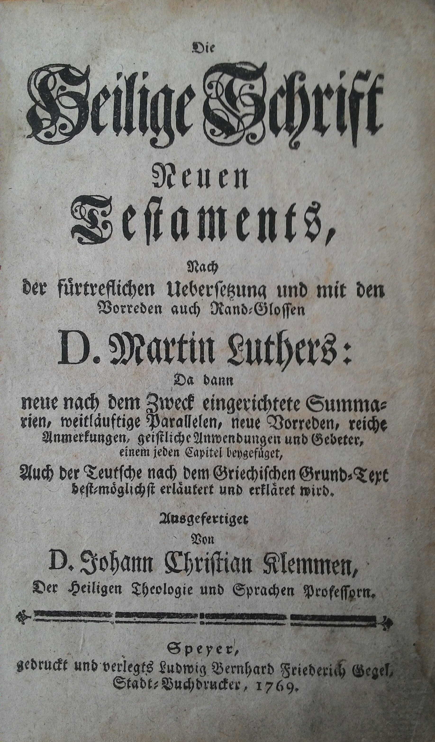 Titelblatt eines Neuen Testaments der Luther-Bibel herausgegeben und bearbeitet durch Johann Christian Klemm